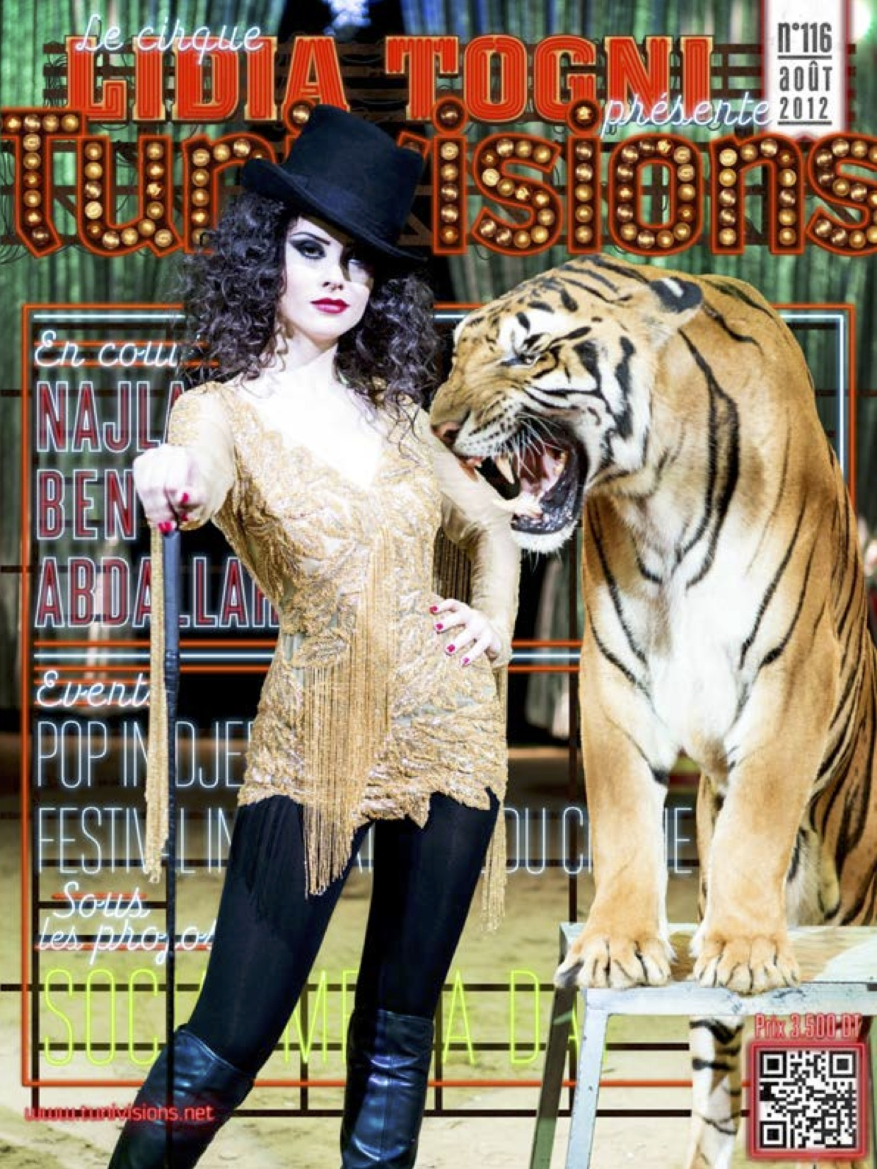 Couverture du numéro 116 du magazine tunisien Tunivisions.